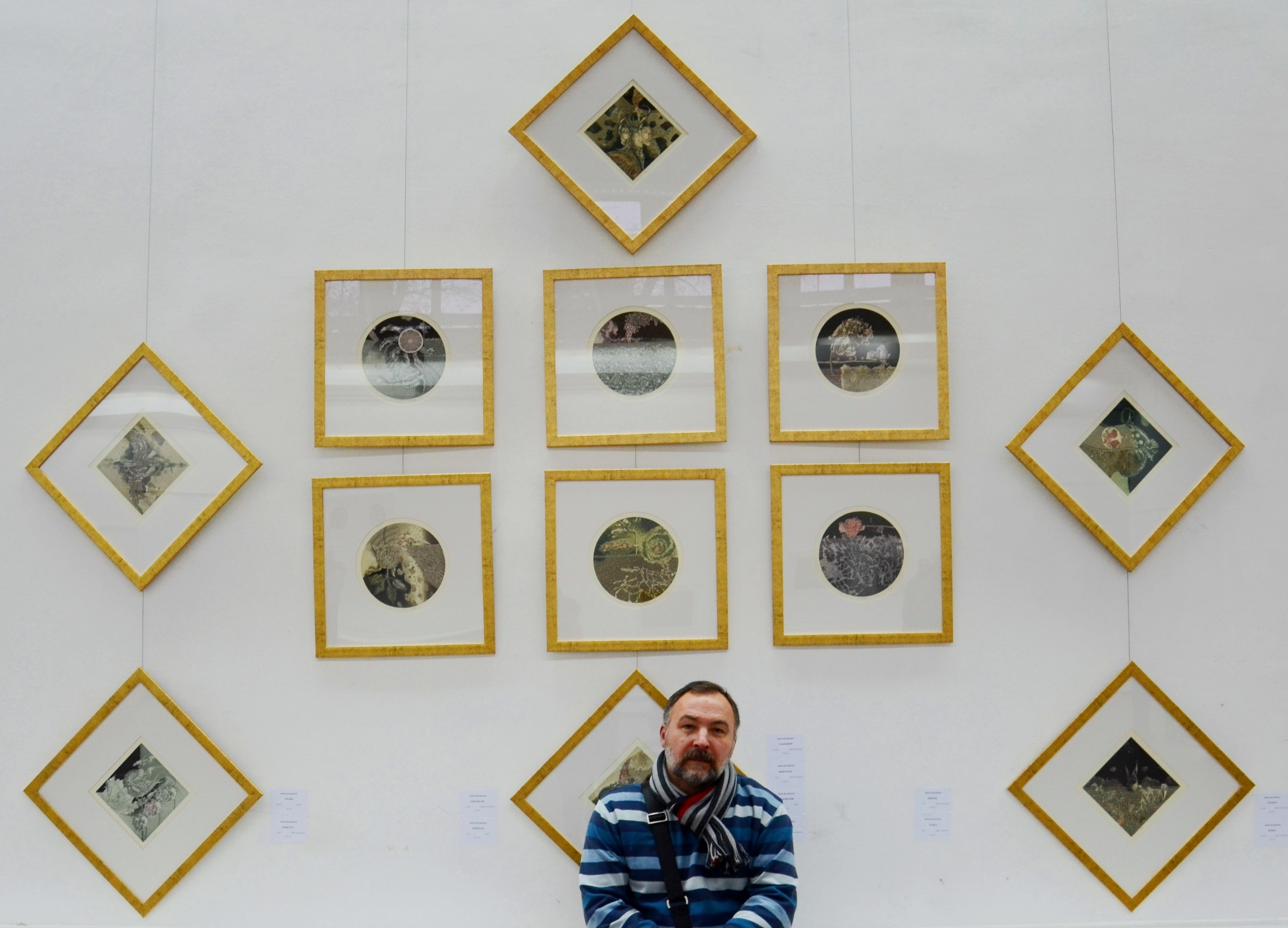 Белорусский художник-график Юрий Яковенко. Вернисаж в минском Дворце Искусств 23.10.2014